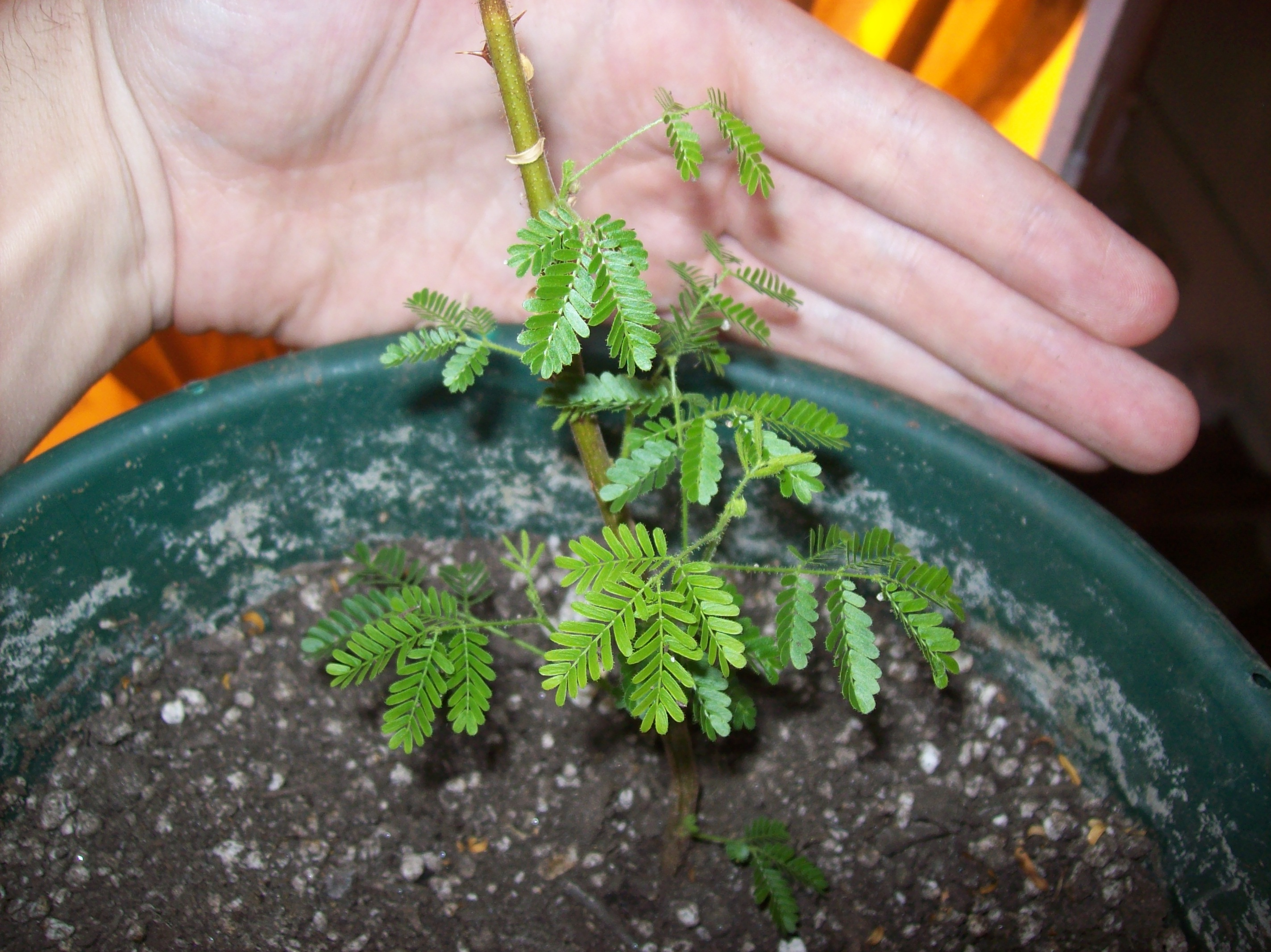 Mimosa tenuiflora syn. Mimosa hostilis